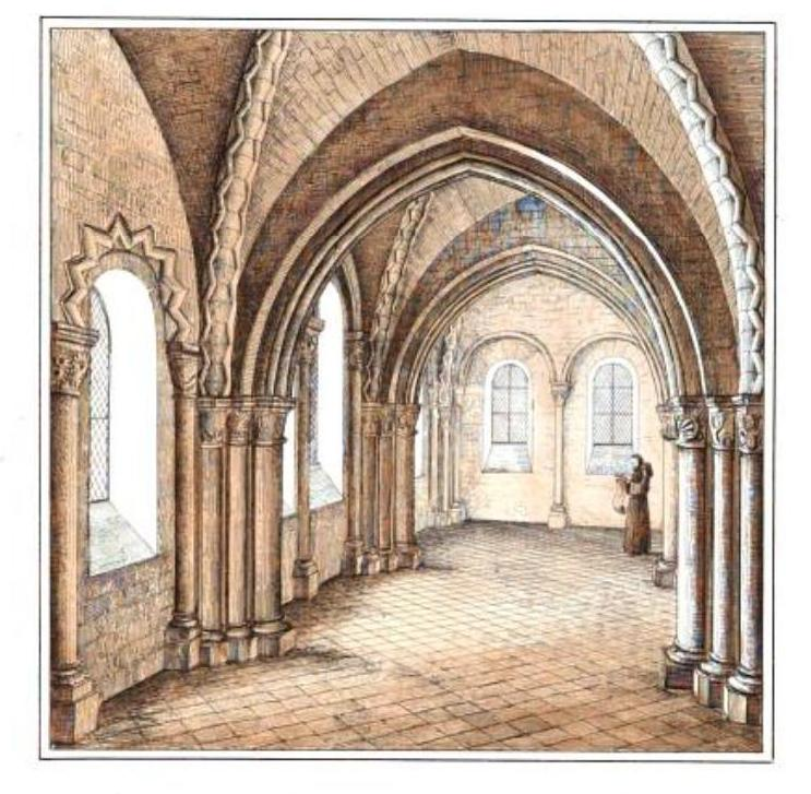 Salle voûtée de la tribune à l'étage de l'avant-nef romane.